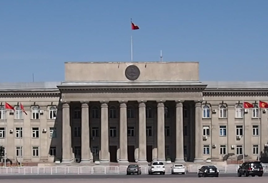 P9170504 03